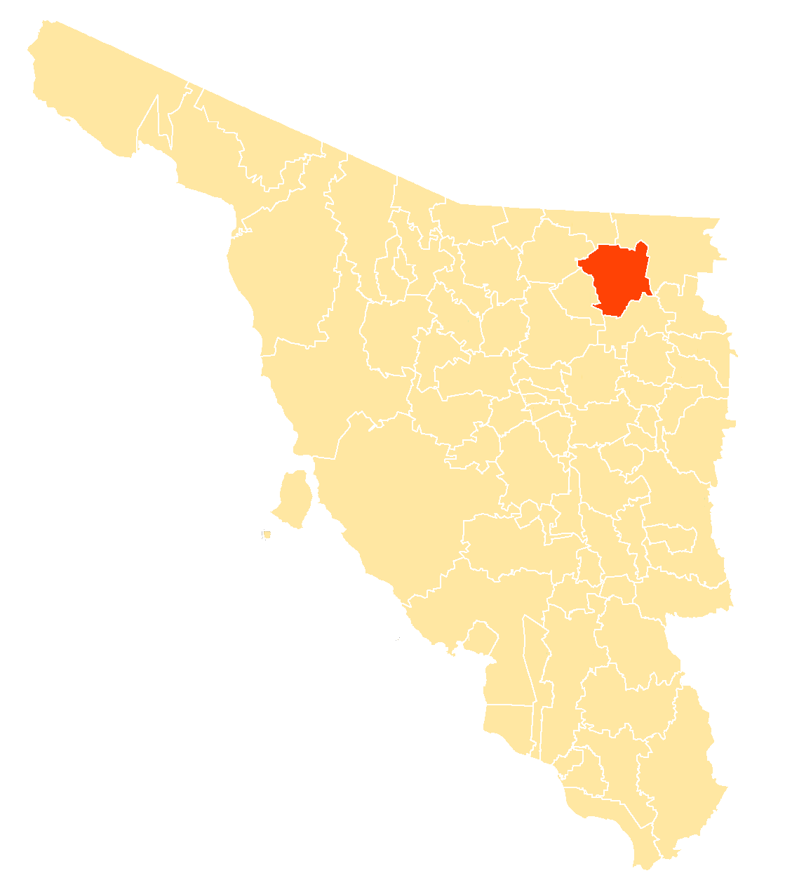 Municipio dentro de Sonora, México.